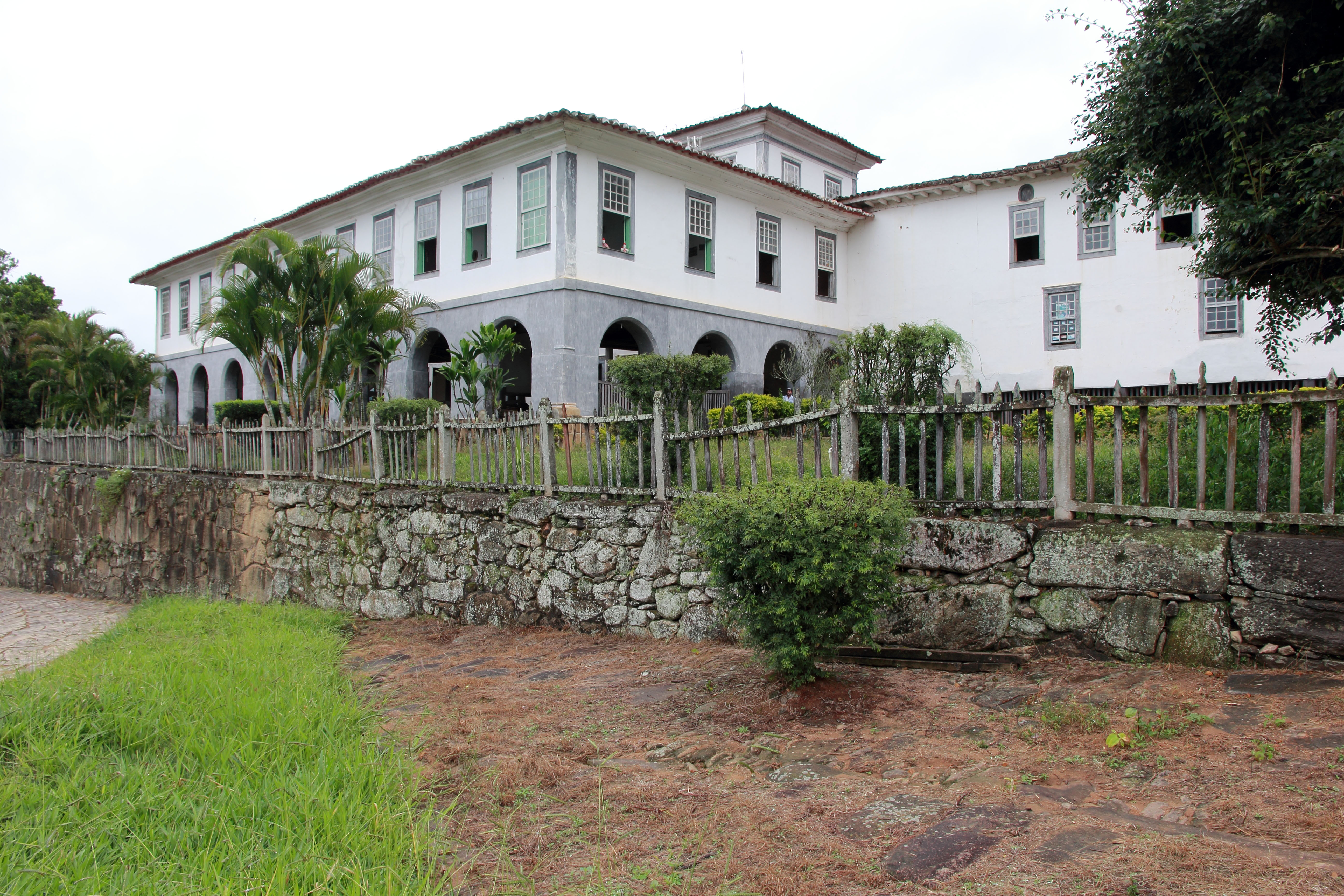 A Fazenda Santa Clara está localizada no município brasileiro de Santa Rita de Jacutinga, no estado de Minas Gerais.